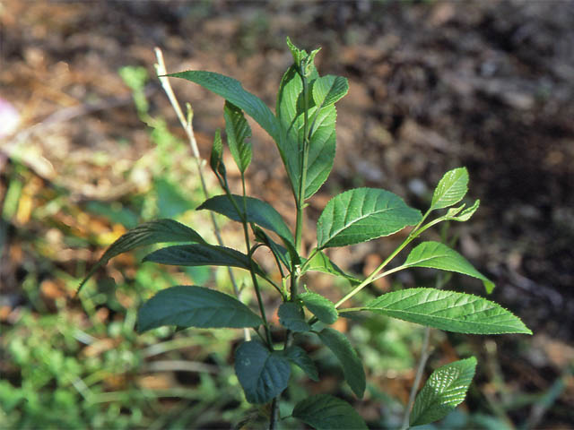 ハンノキの葉、東京・小石川植物園で2007年5月に撮影 ojas de Alnus japonica, Jardin botanico Koishikawa, Tokyo, japon. mayo, 2007.